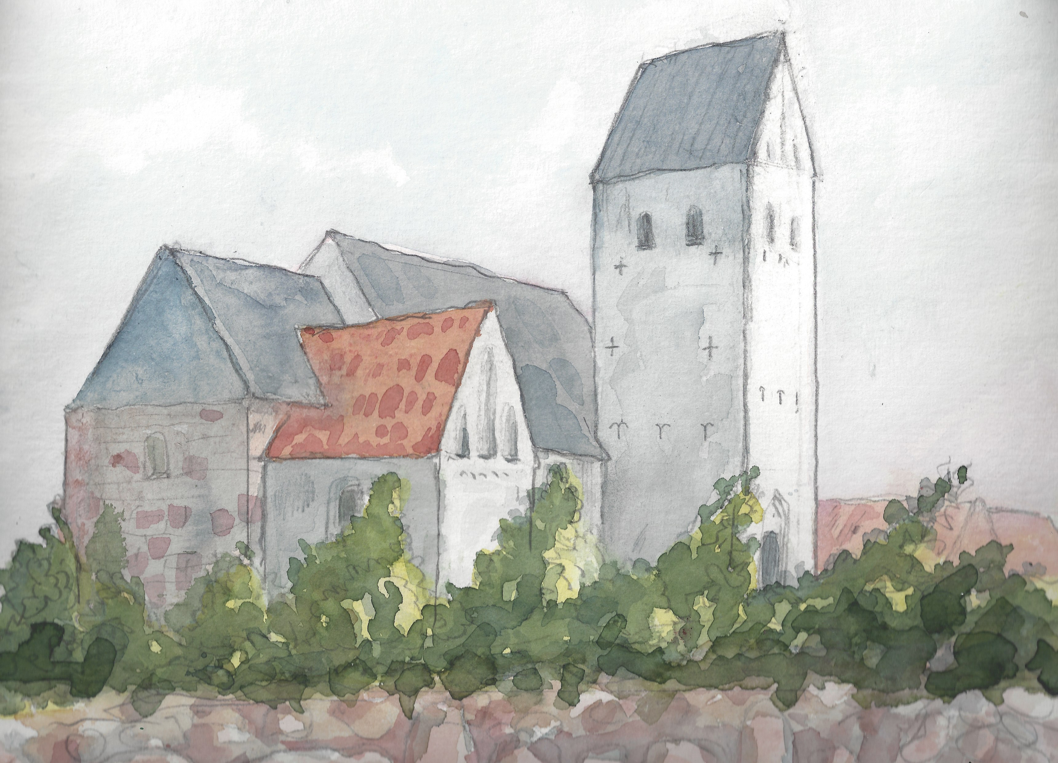 Hemmet kirke